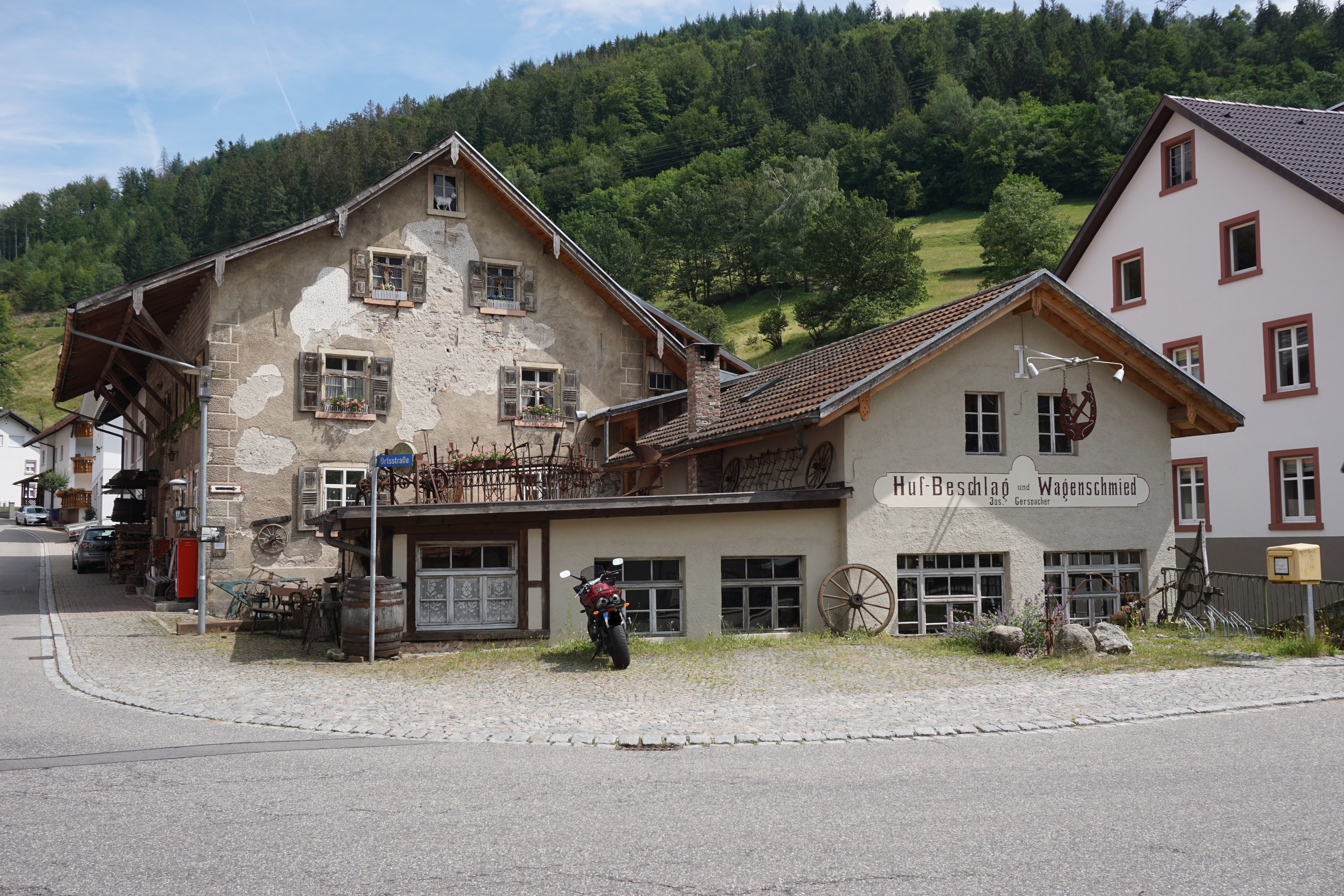 Museum "Alte Schmiede" in Mambach